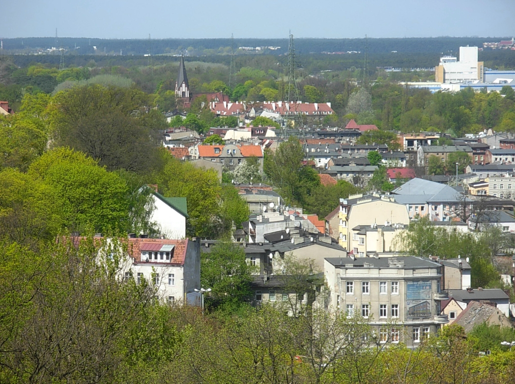 Widok z wieży ciśnień w Bydgoszczy w kierunku zachodnim (Wilczak)